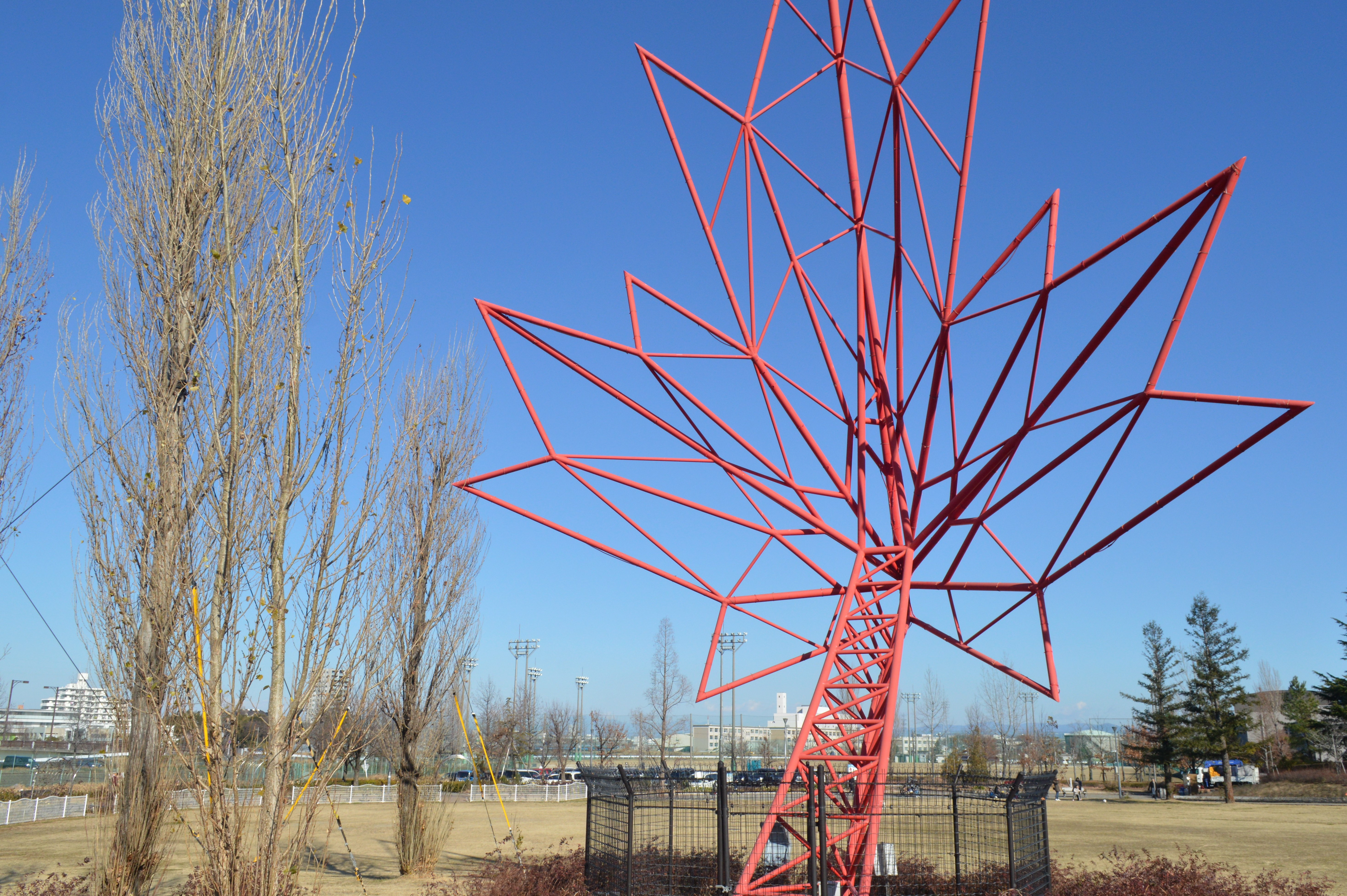 愛知県刈谷市にあるミササガパーク。モニュメント「メイプルリーフ」。元は2005年の愛知万博でカナダ館前に展示されていた。